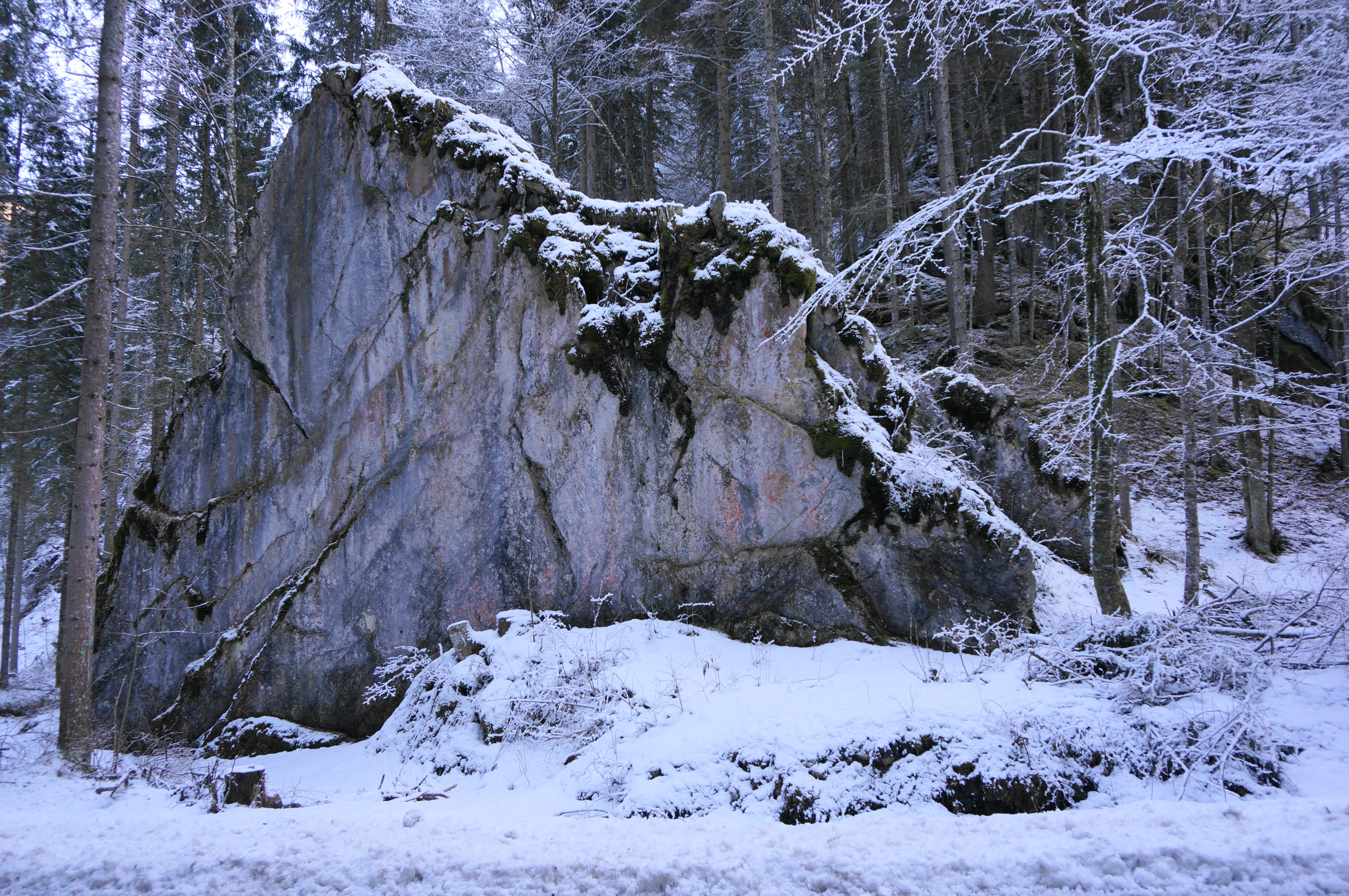 Die Hundskirche befindet sich im Kreuzenbachtal, entlang der L33 Landesstraße in Kreuzen, Gemeinde Paternion, Bezirk Villach Land. Es ist eine senkrecht abfallende Felswand mit Markierungen aus unterschiedlichen Epochen, wo sich die Kryptoprotestanten in geheimen Treffen versammelten.